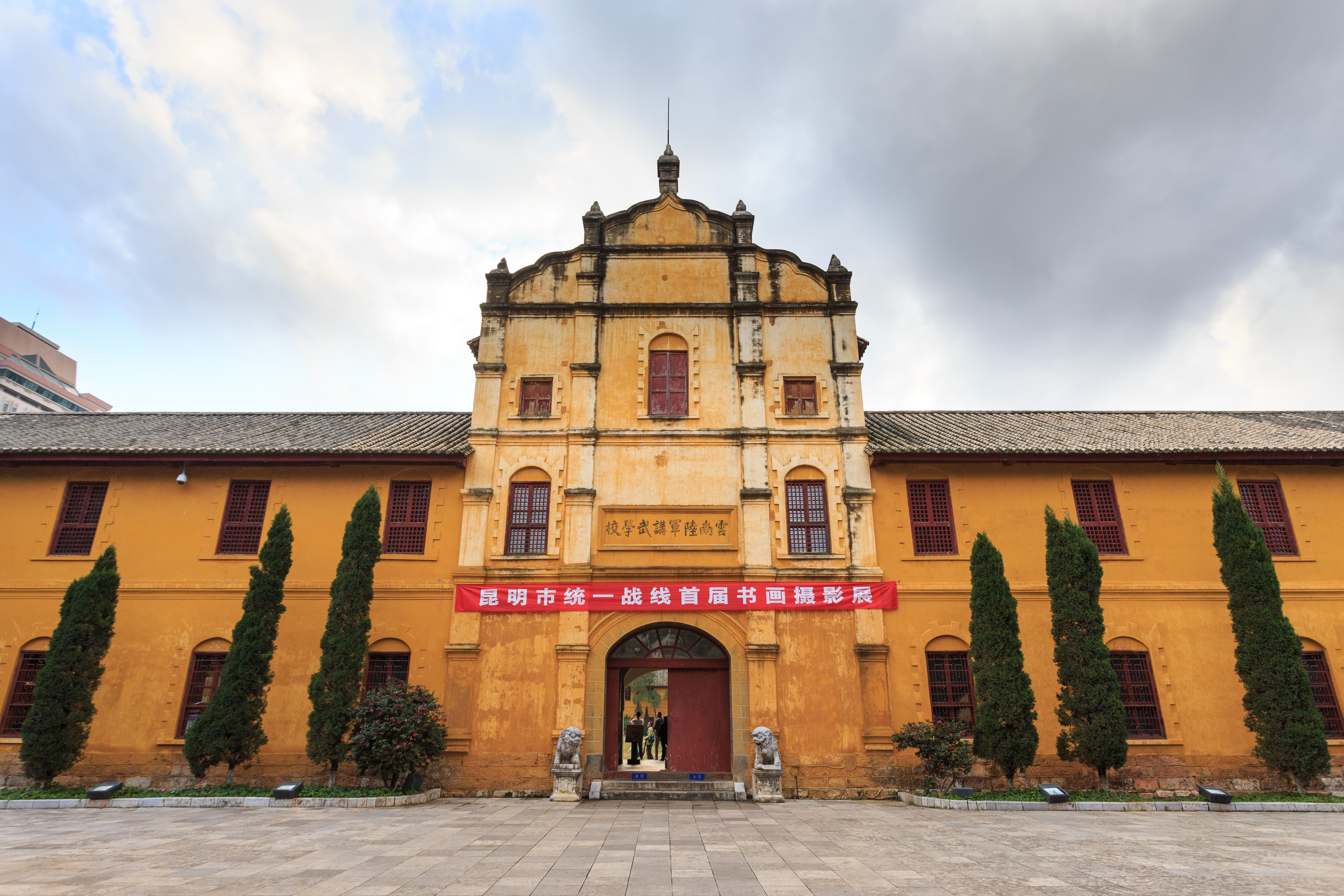 云南陆军讲武堂旧址